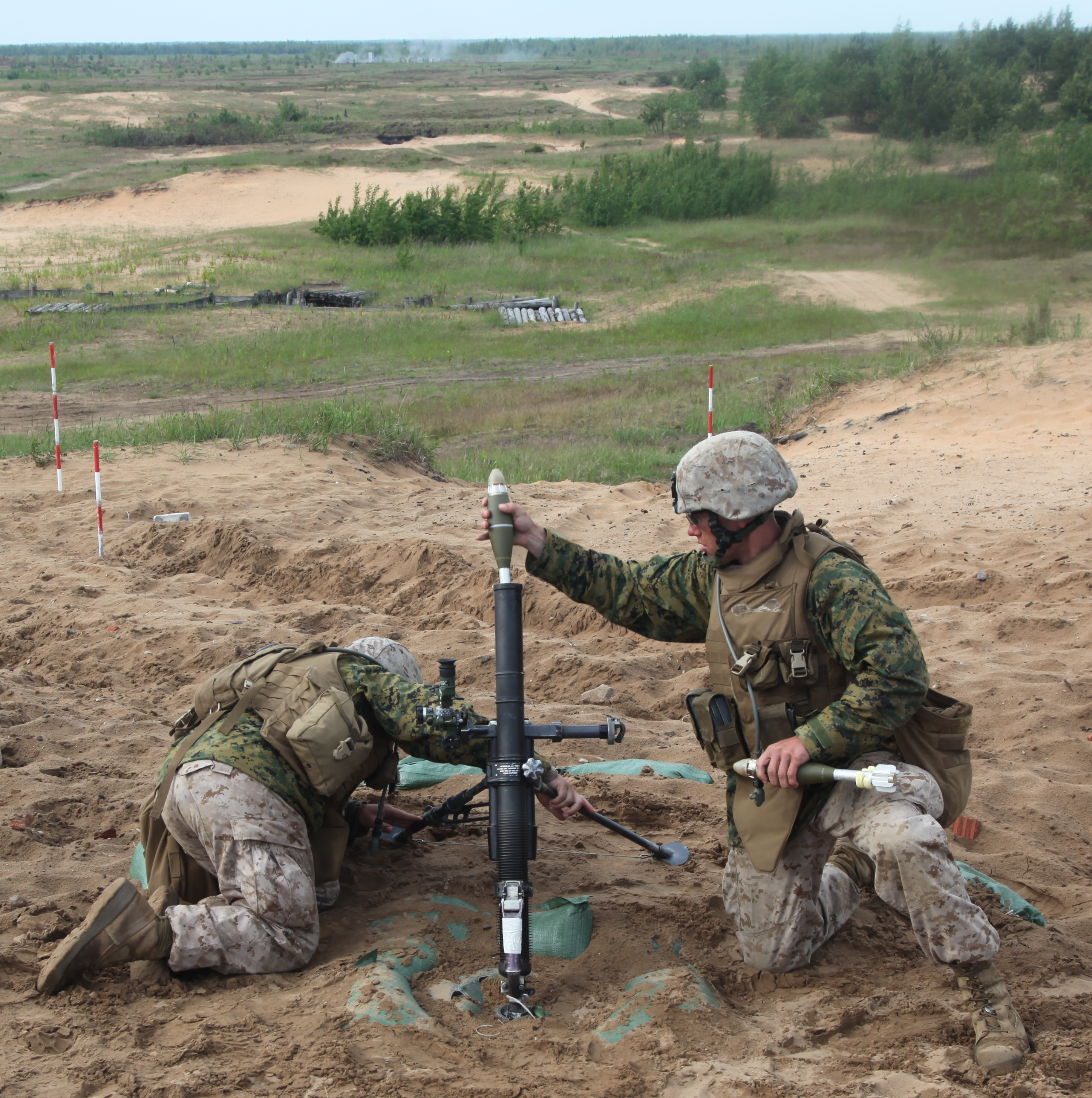 USMC Mortar support at Saber Strike 2012